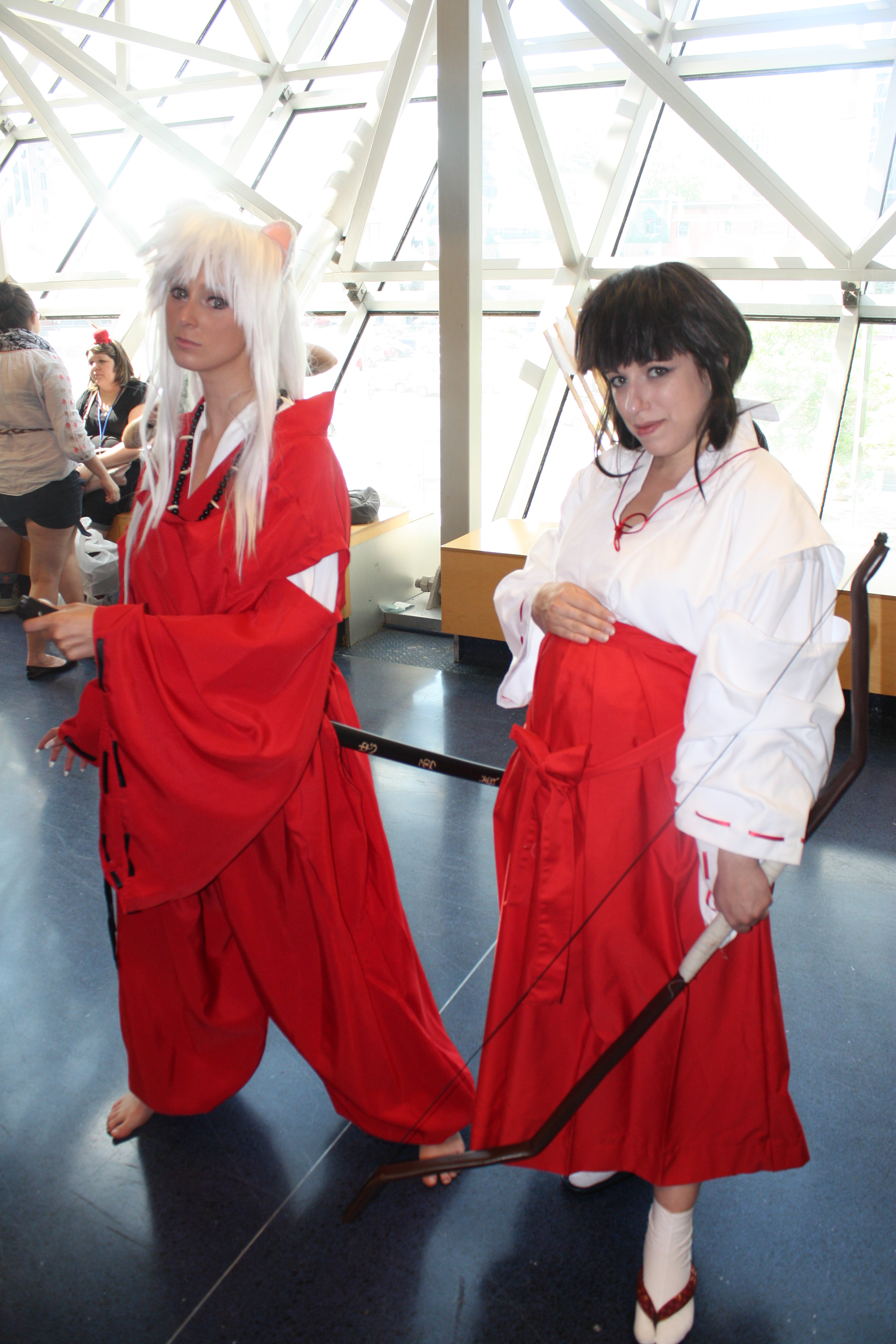 Otakuthon 2014: Inuyasha and Kikyo